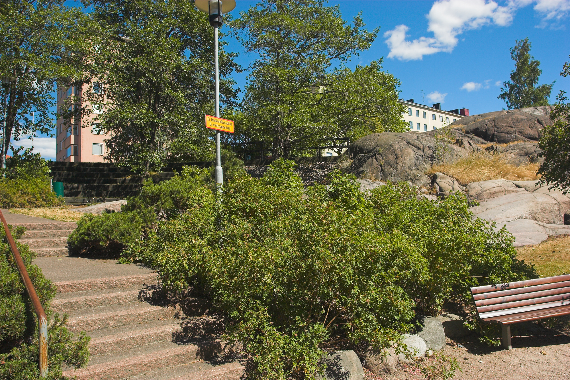 Josafatinpuistoa.